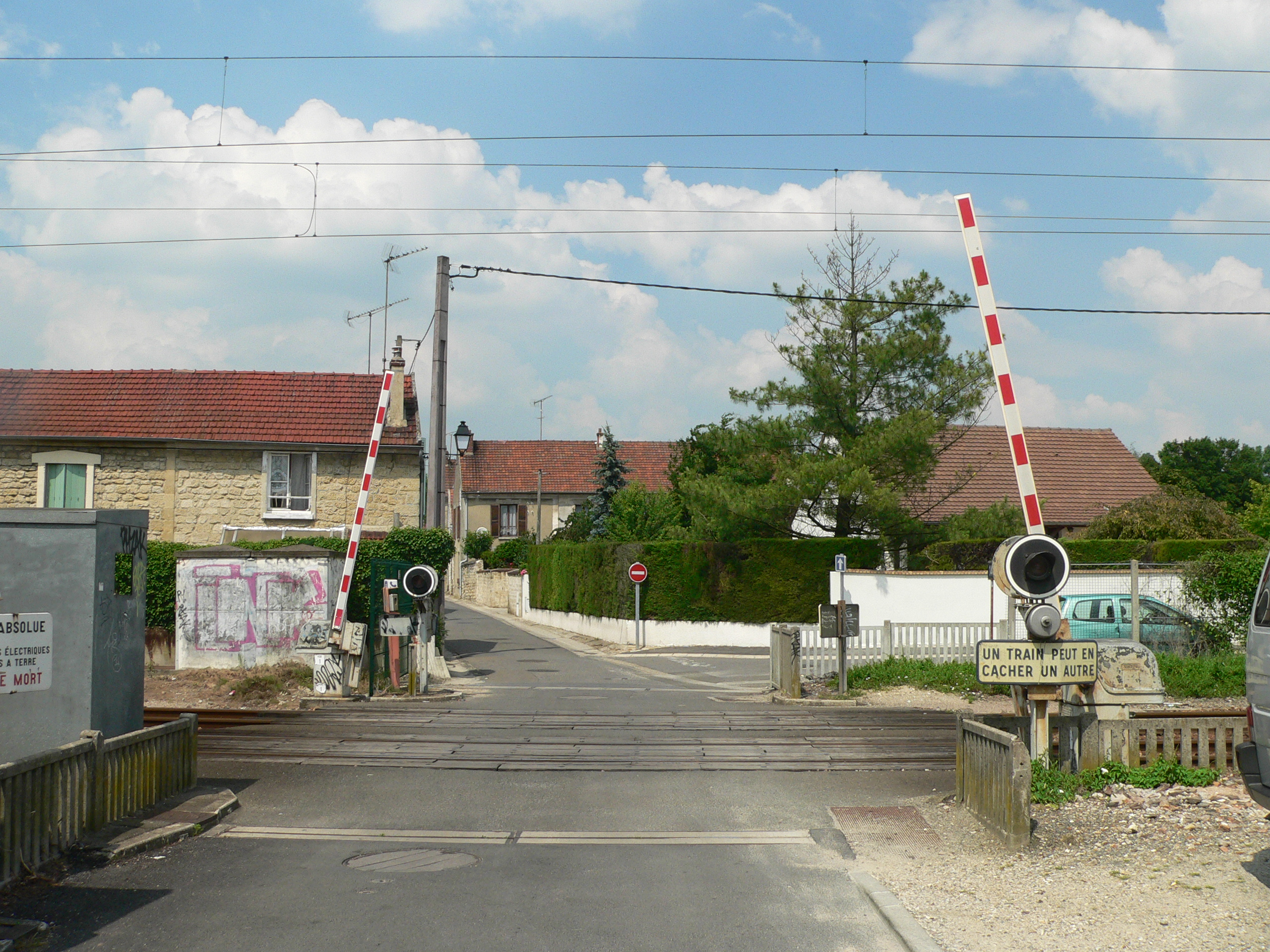 A level crossing near Auvers-sur-Oise, June 2007